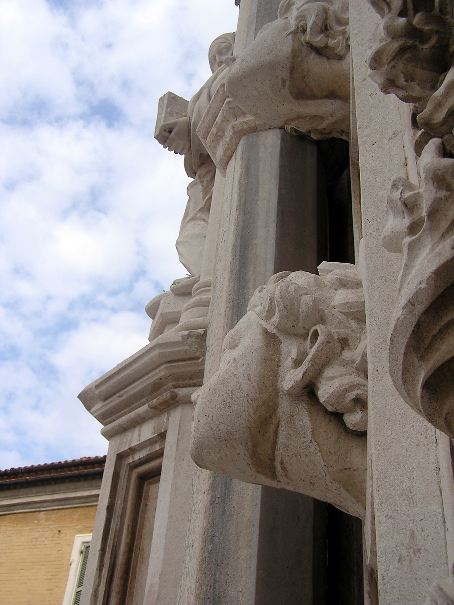 particolare del portale della chiesa di San Francesco alle Scale, di giorgio da Sebenico (detto anche Giorgio di Matteo)